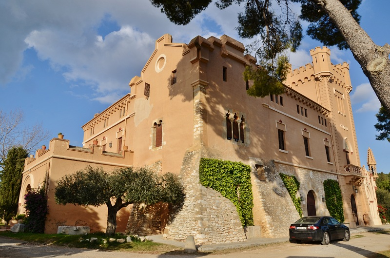 La Torre del Veguer (Sant Pere de Ribes)